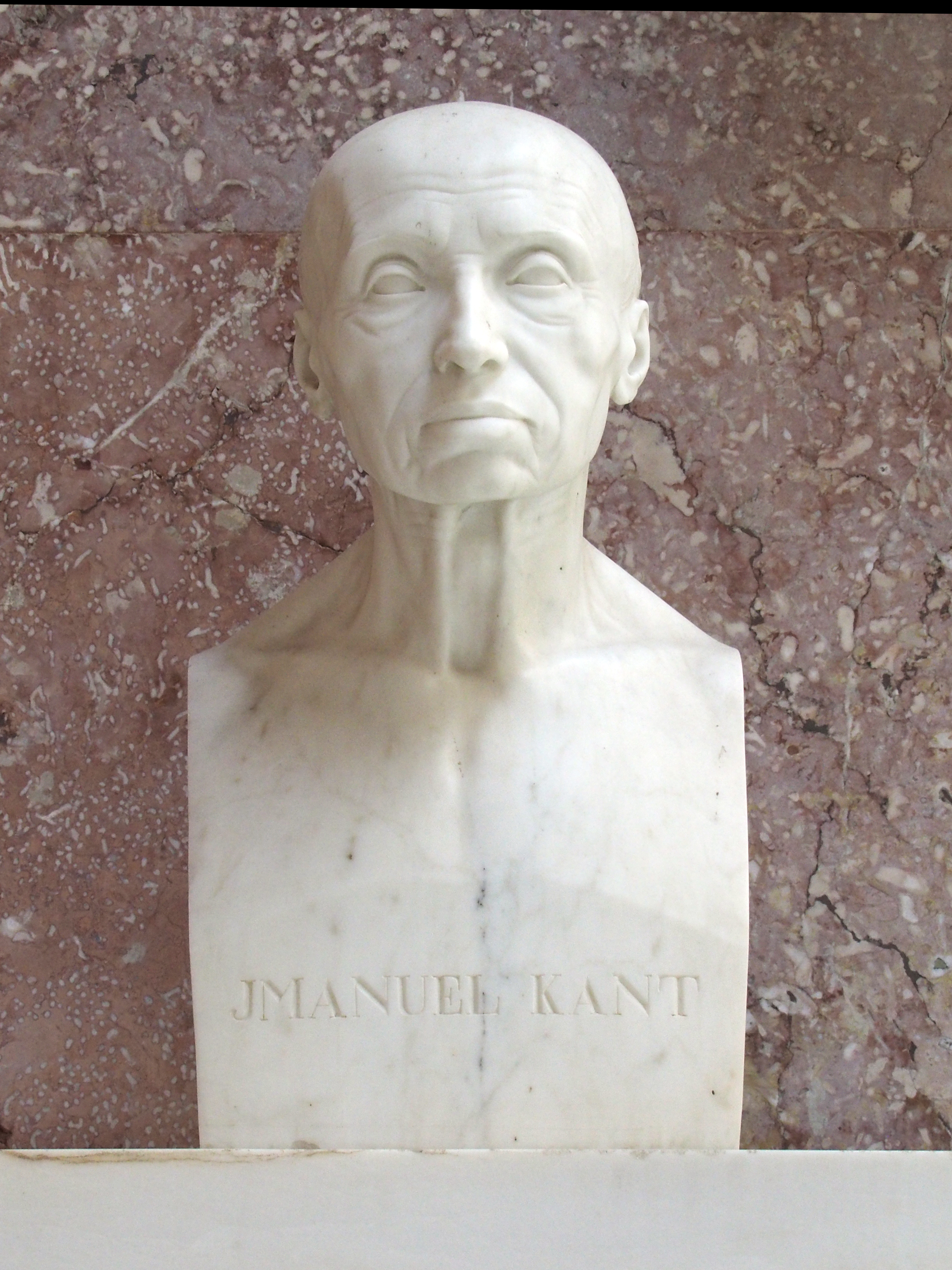 Büste von Immanuel Kant, Bildhauer Johann Gottfried Schadow (1808), in der Walhalla bei Regensburg